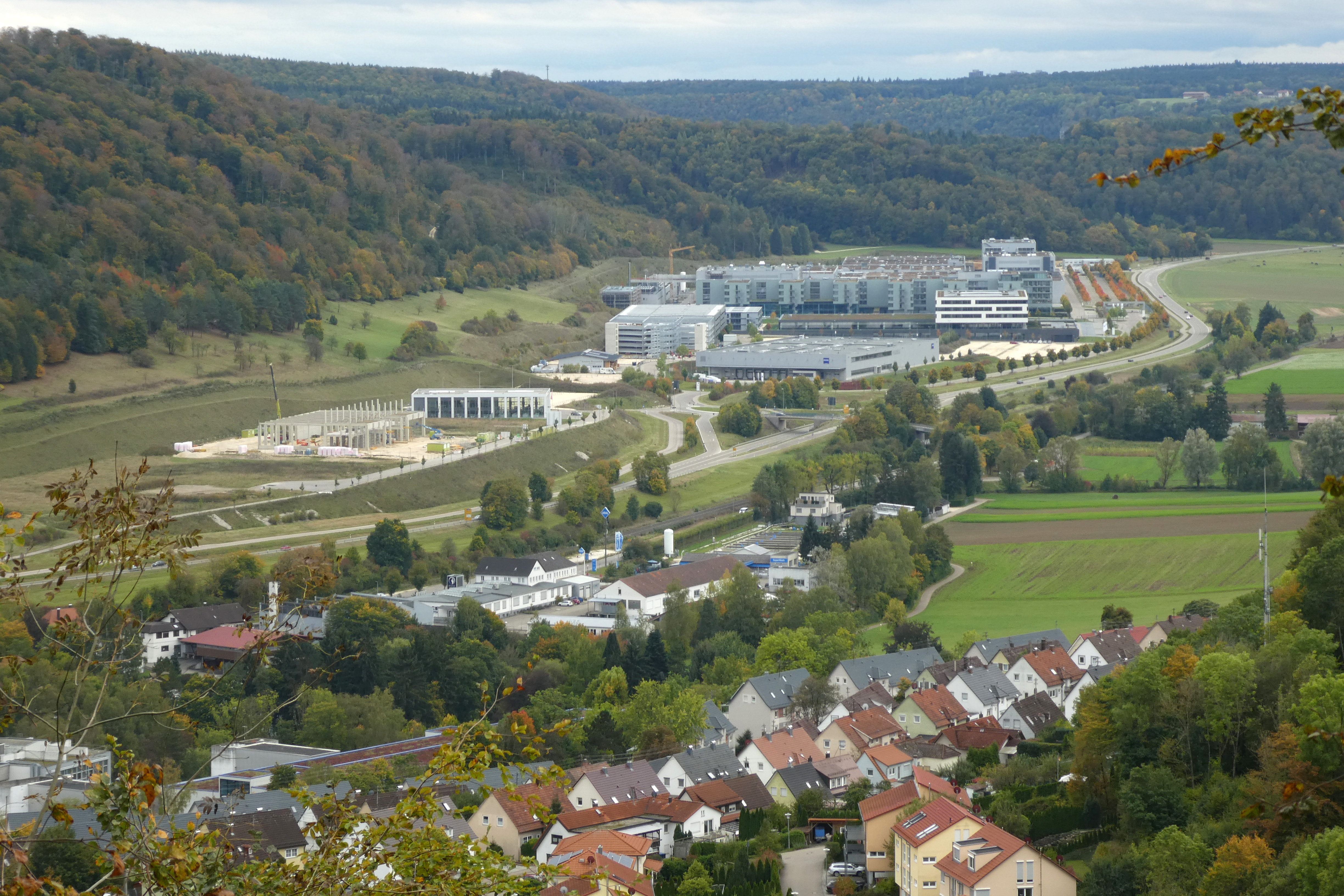 Oberkochen - Industriegebiet Süd I (im Hintergrund vollständig mit Fabriken der Firma Zeiss bebaut) und II (im Vordergrund mit der Firma OWEMA und dem im Bau befindlichen Techlologiezentrum von YG-1) aus nördlicher Richtung fotografiert.